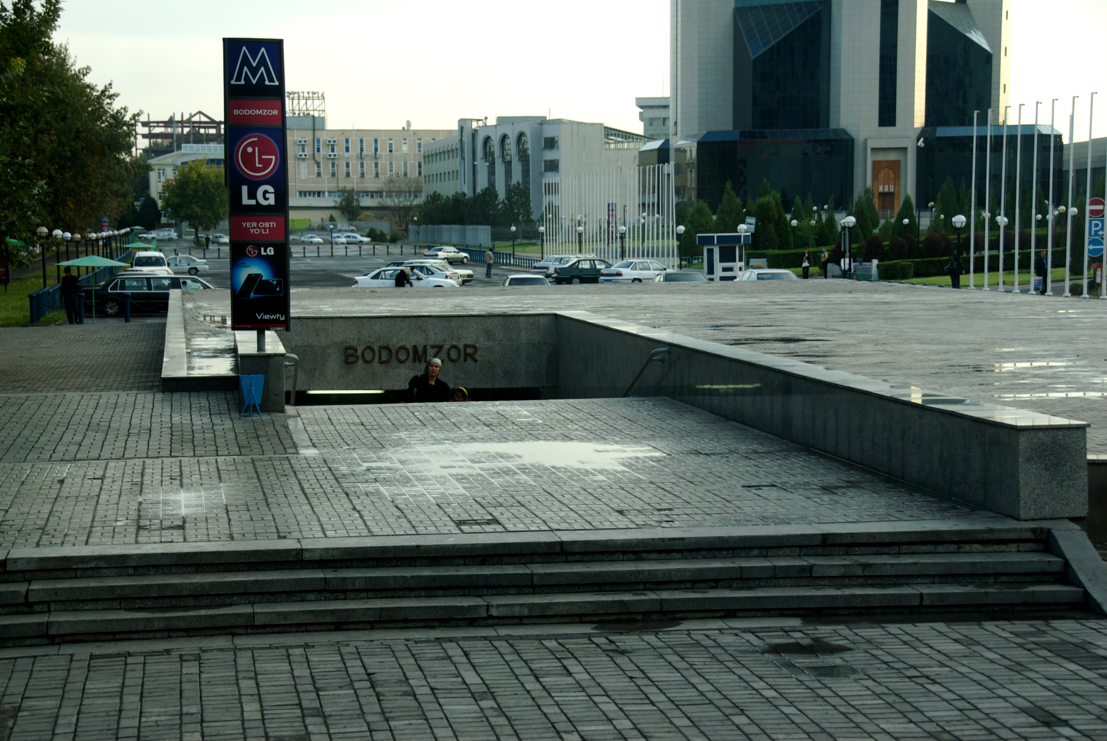 stans08-287